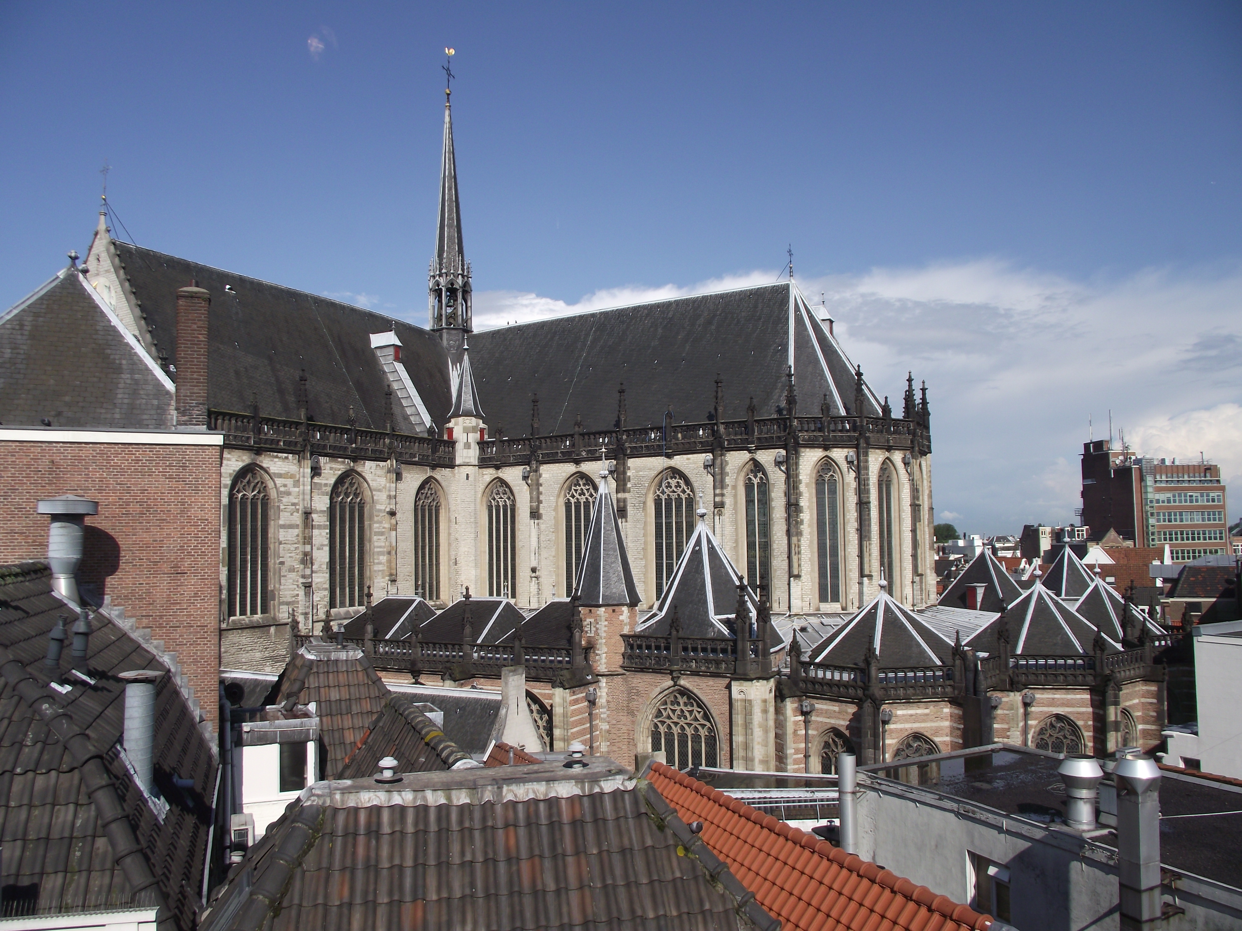 Amsterdam, Nieuwe Kerk, 1408-1645